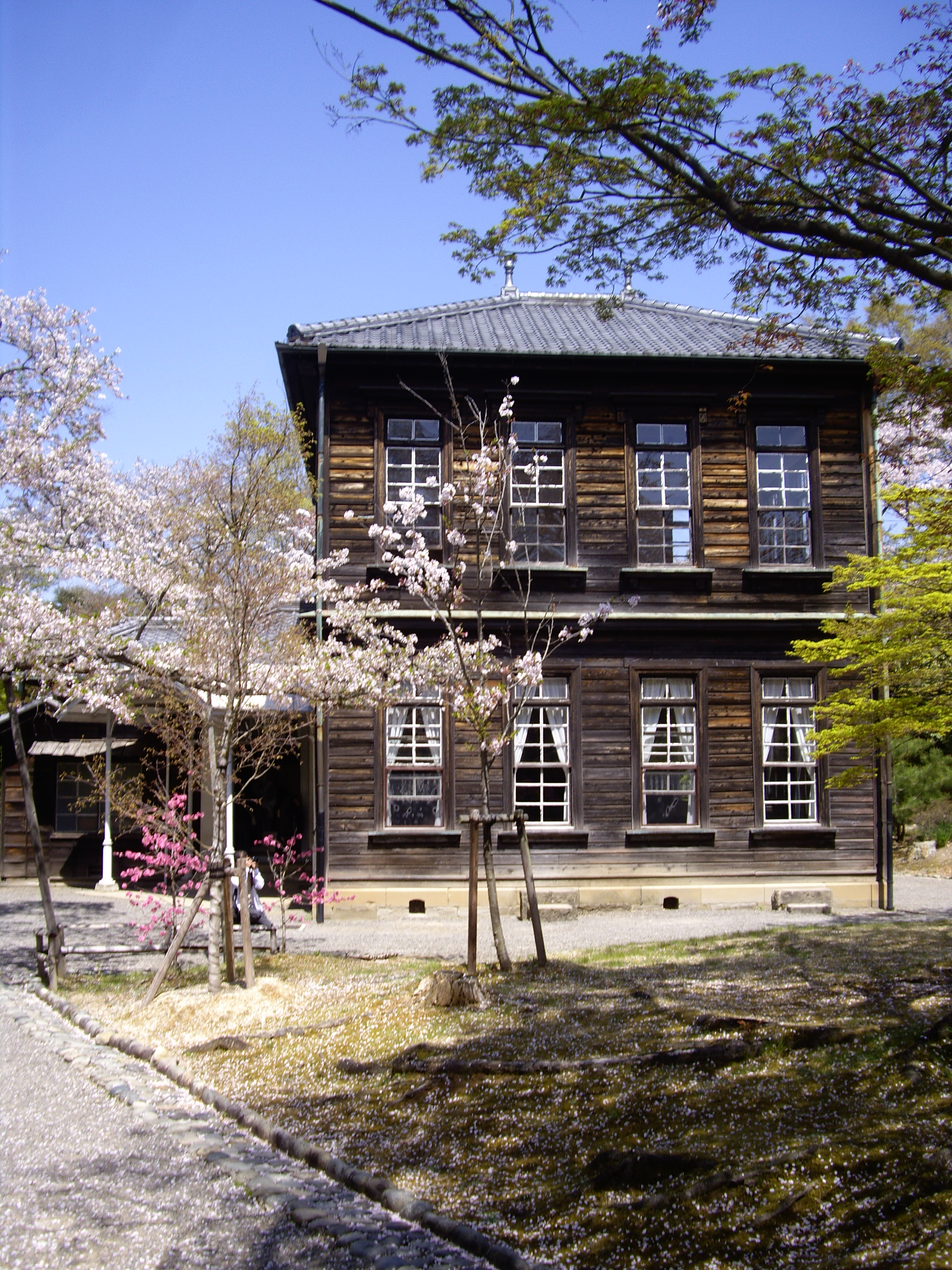 Dienstwohnung des Schuldirektors der Gakushūin-Schule (学習院長官舎) im Freilichtmuseum Meiji Mura